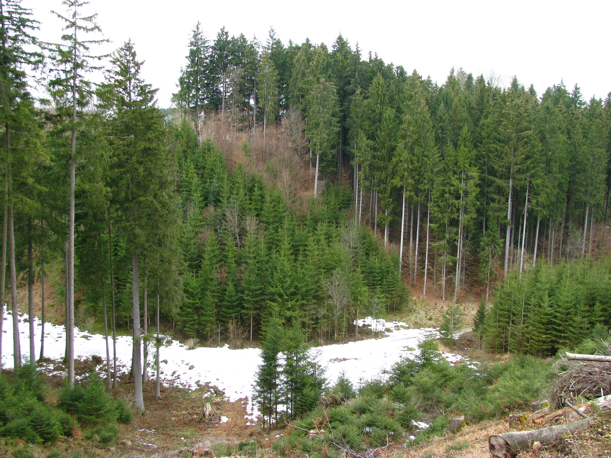 Das Gleißental bei Ödenpullach in der Gemeinde Oberhaching